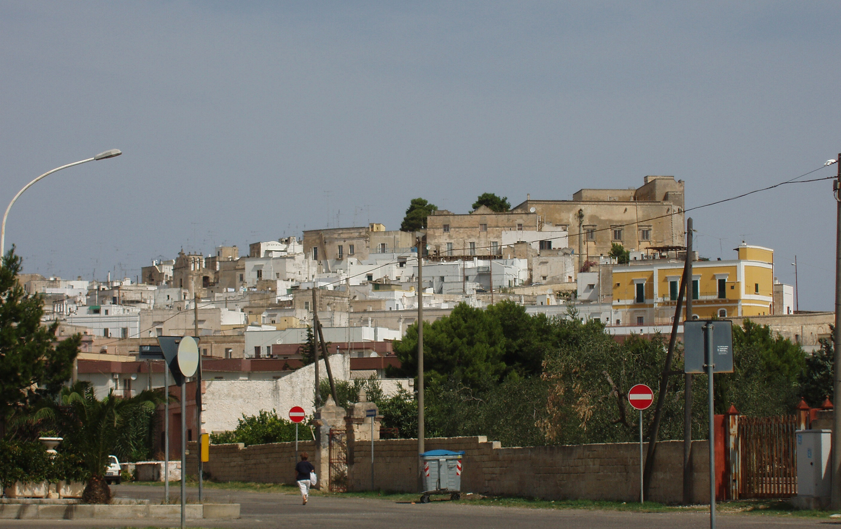 Castellaneta - Paese vecchio